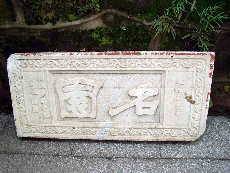 重修時發掘出土